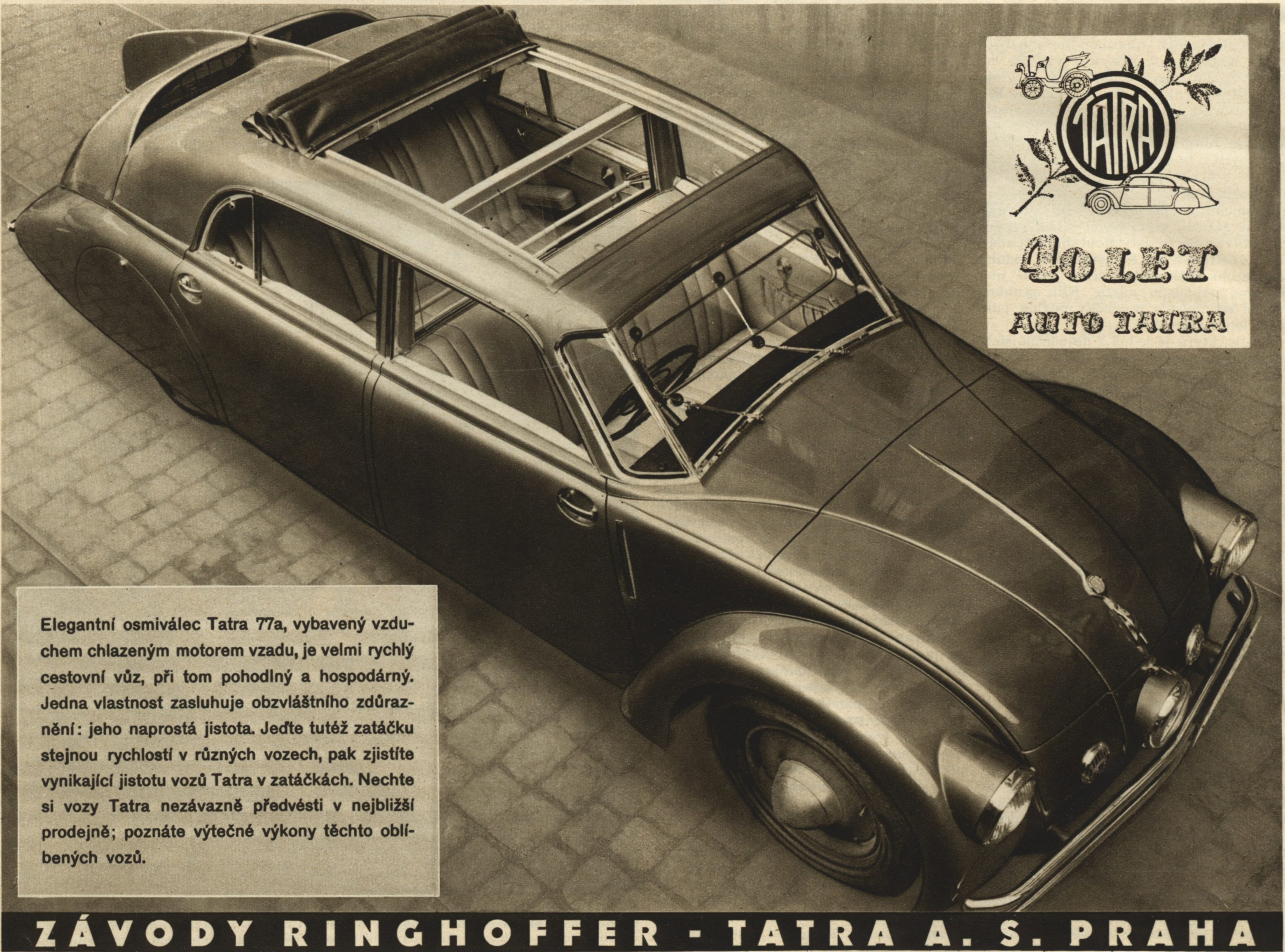 Reklama v časopise Pestrý týden